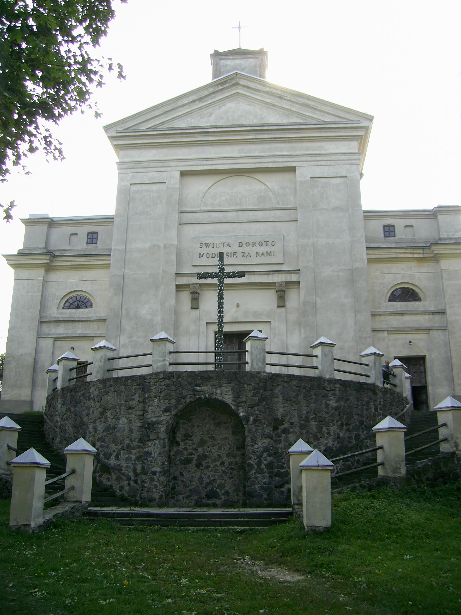 Хмельницька обл. Славута . Церква Святої Дороти